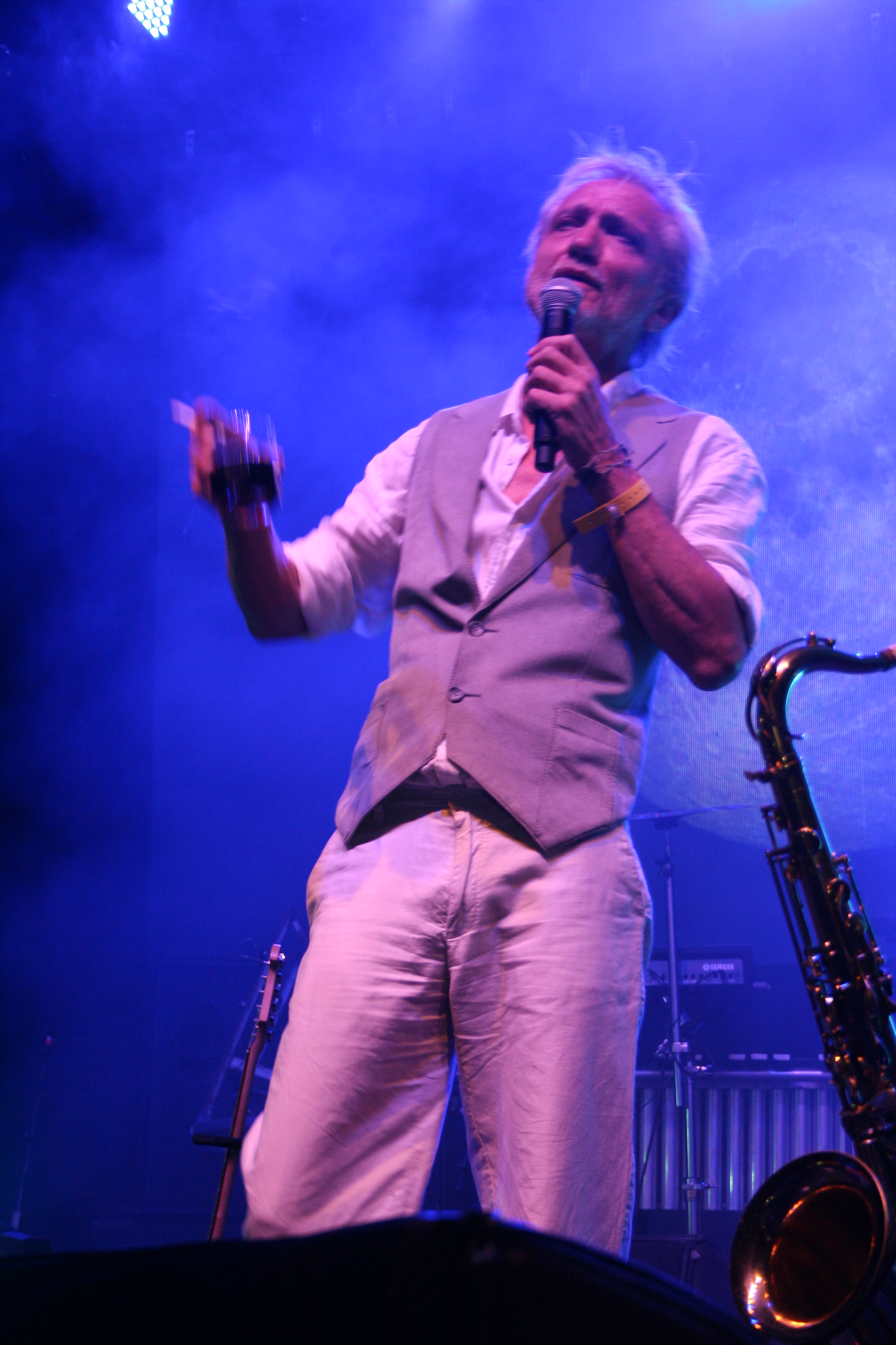 Darko Rundek, koncert na Šabačkom letnjem festivalu, 2017.